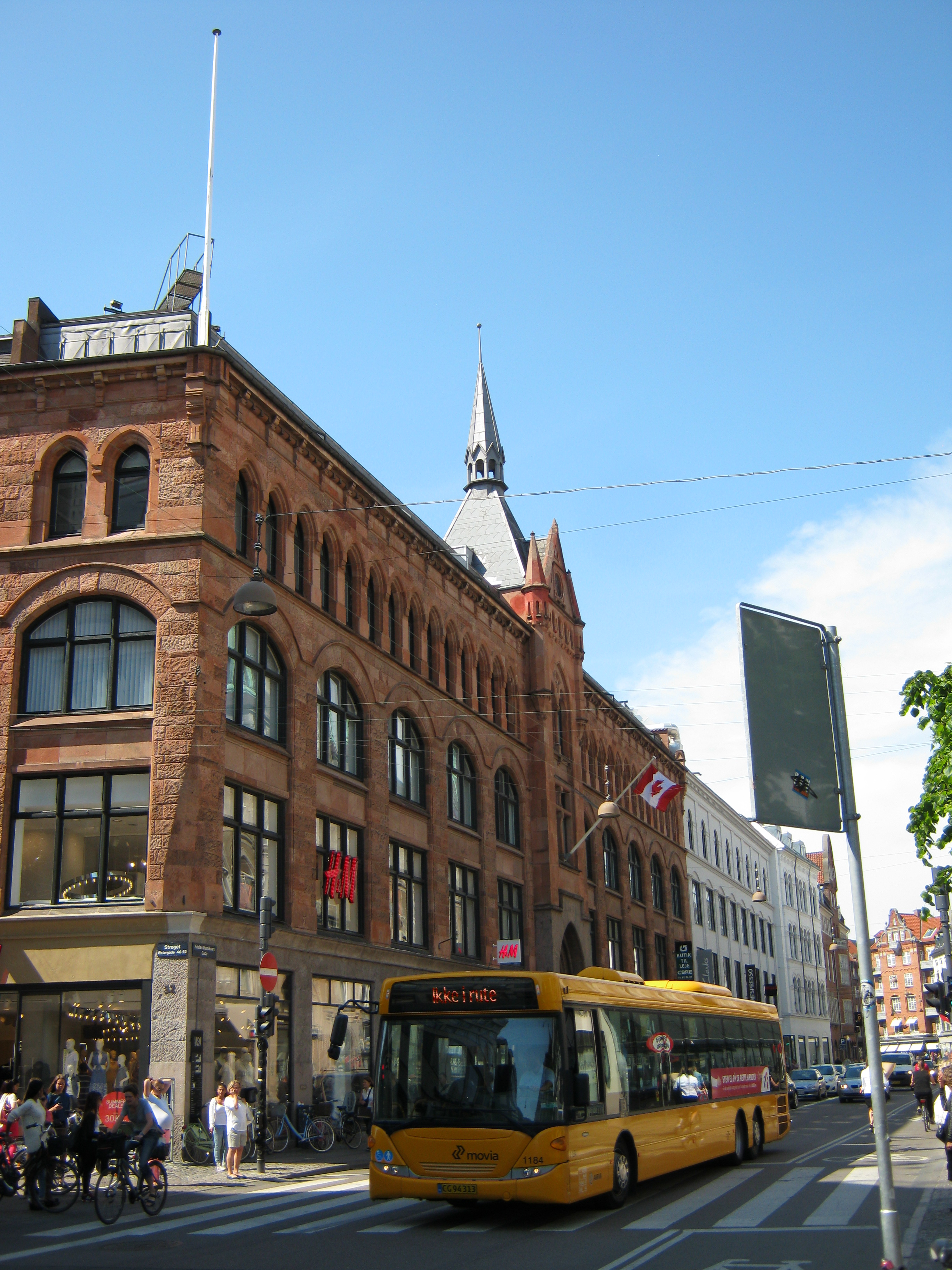 Galleri K in Copenhagen, Denmark